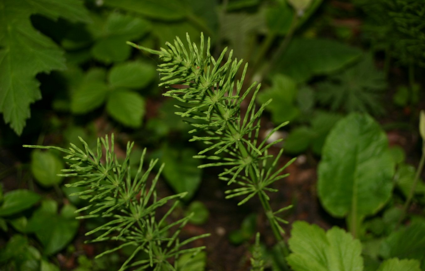 Equisetum arvense: Vegetative shoot.